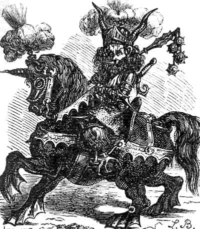 Alloces conforme o "Dictionnaire Infernal".